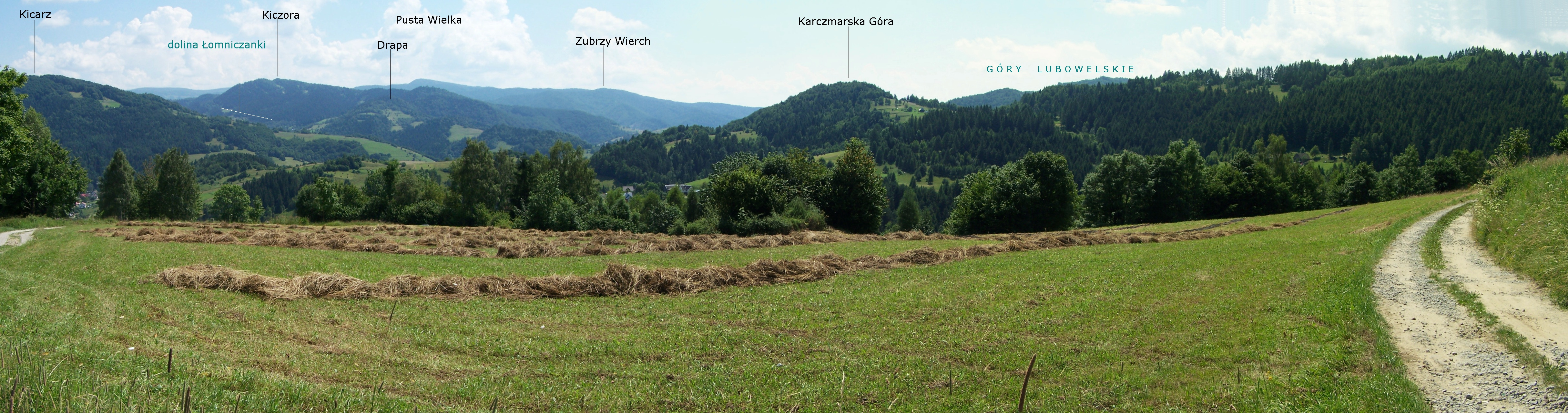 Panorama z Piwnicznej (przysiółek Kosmydle - Kijanki)